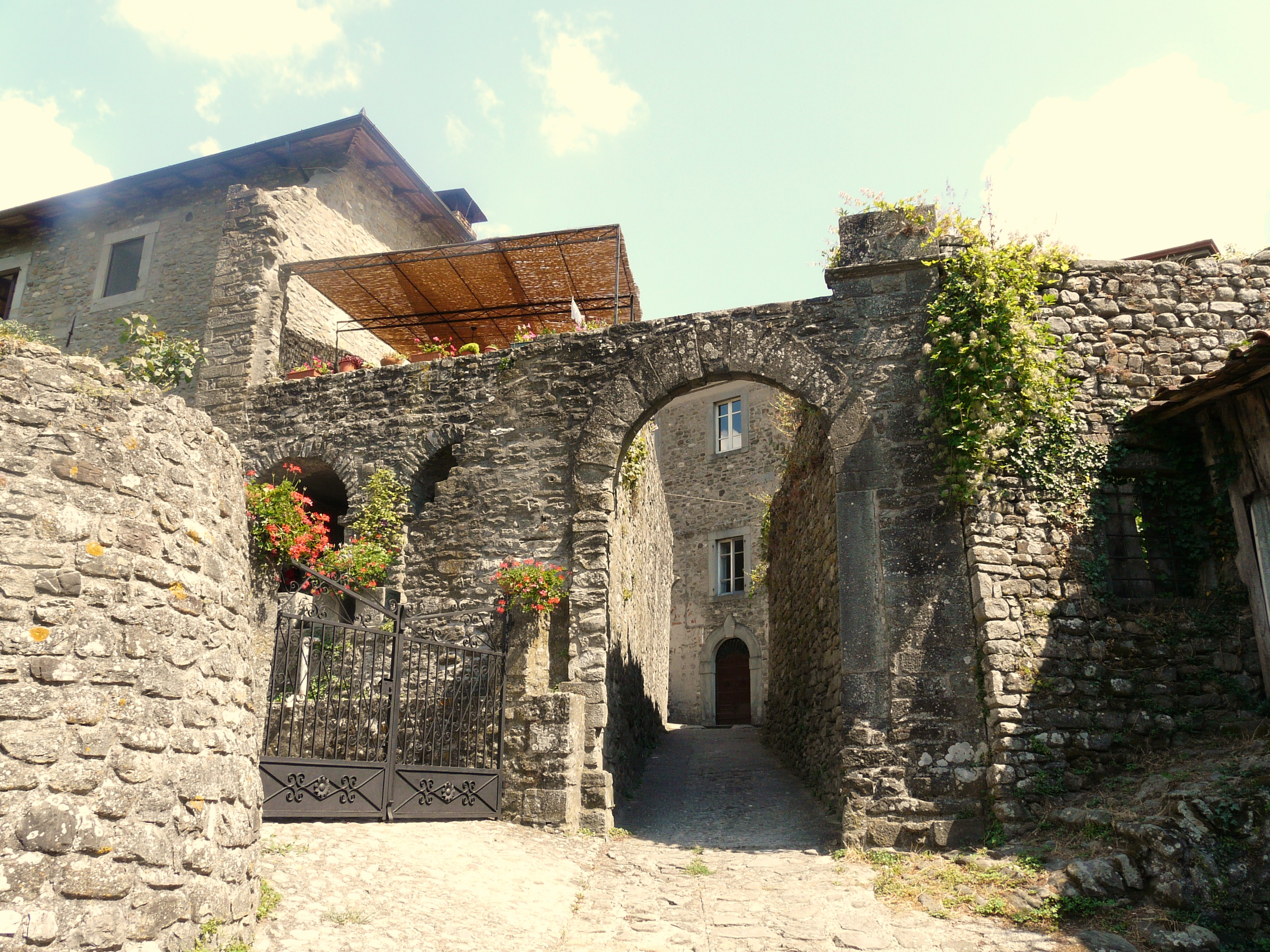 Porta del centro storico di Casola in Lunigiana, Toscana, Italia